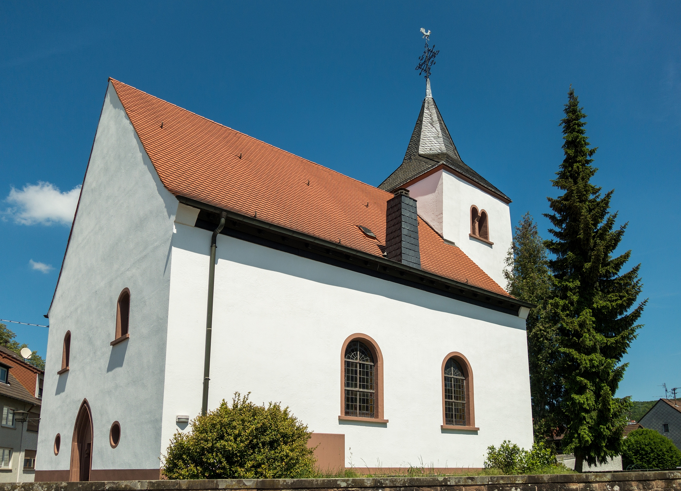 Die Evangelische Kirche Bübingen in Saarbrücken. Das Schiff stammt aus dem 18., das Portal aus dem 14. und der Turm aus dem 12. Jh. Die Orgel der Fa. Stumm wurde 1881 angeschafft.